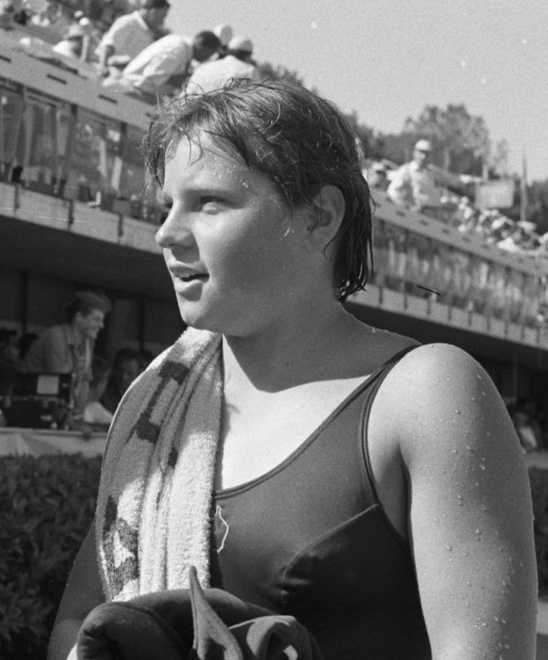 Ilsa Konrads, 1960 Olympics